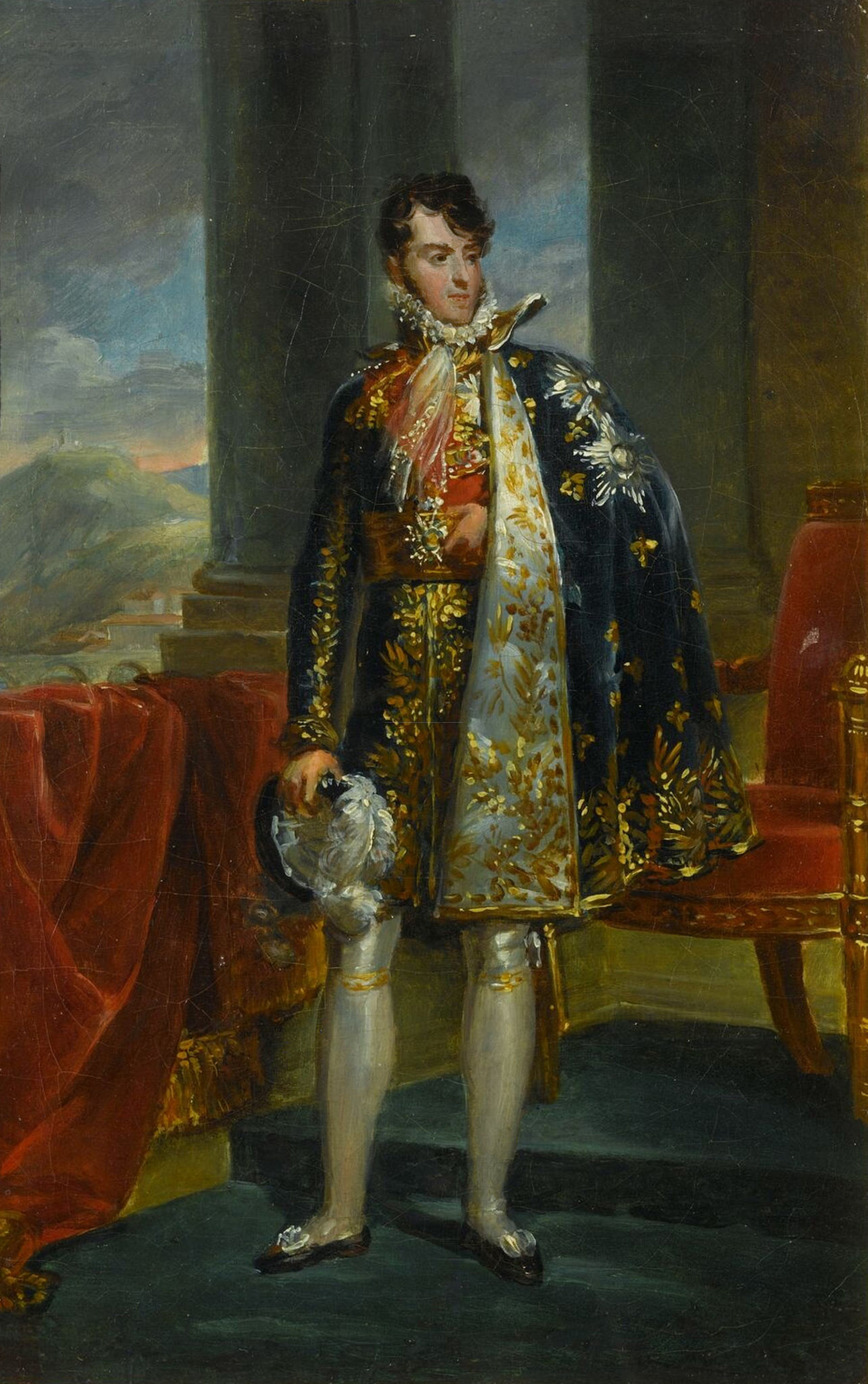 Portrait of Camilie Borghèse